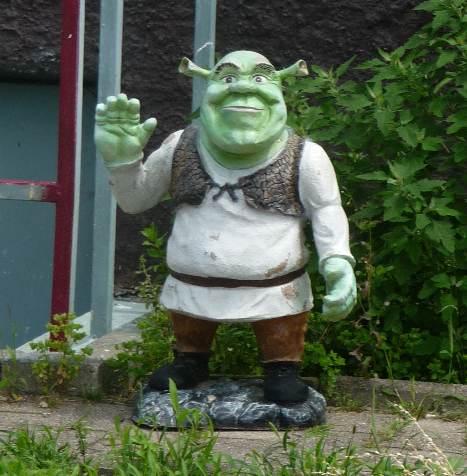 A Shrek statue.